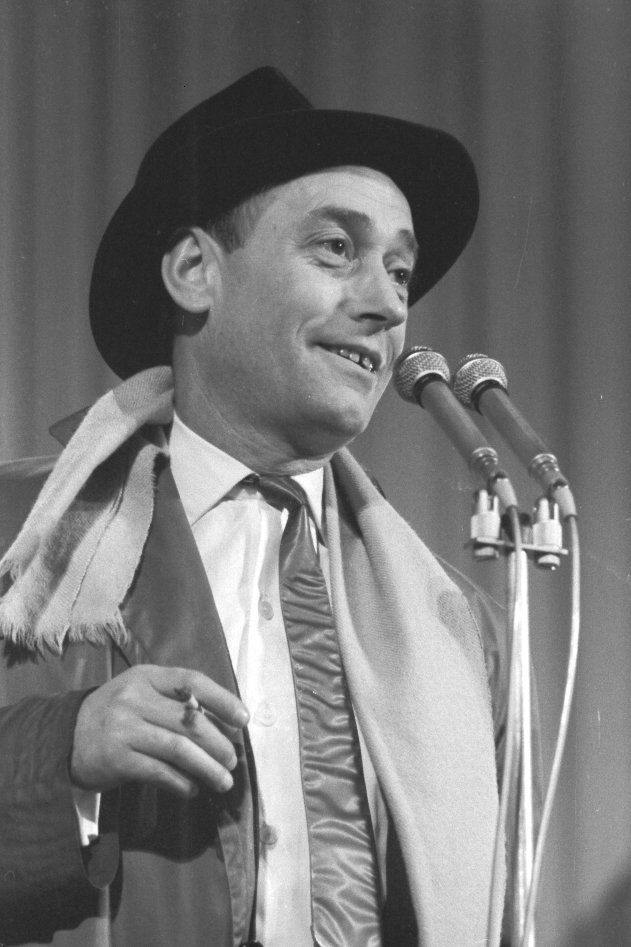 Milan Srdoč (1920—1988), srpski filmski glumac, 1962. godine